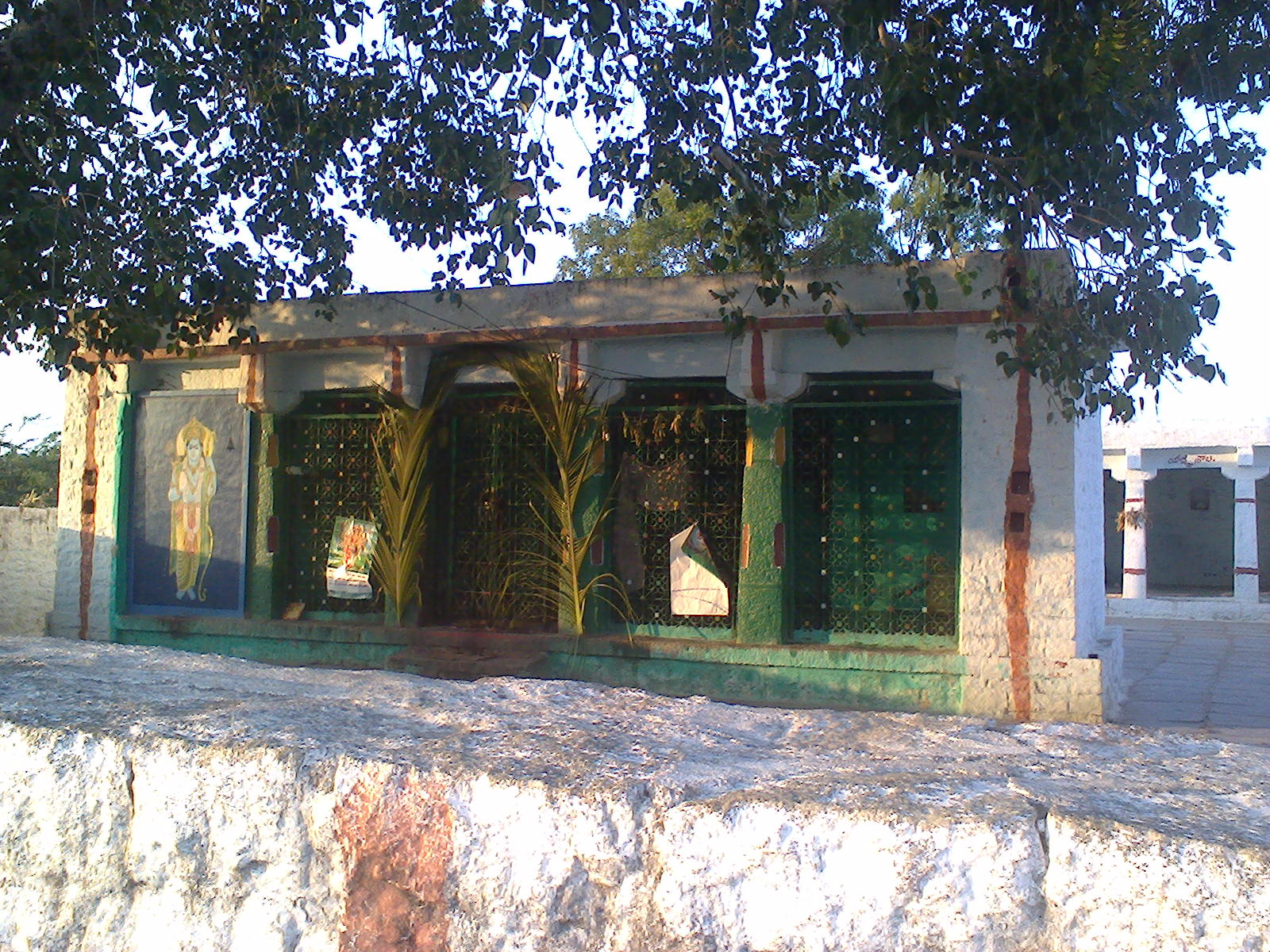 Sri Anjaneya Swamy temple